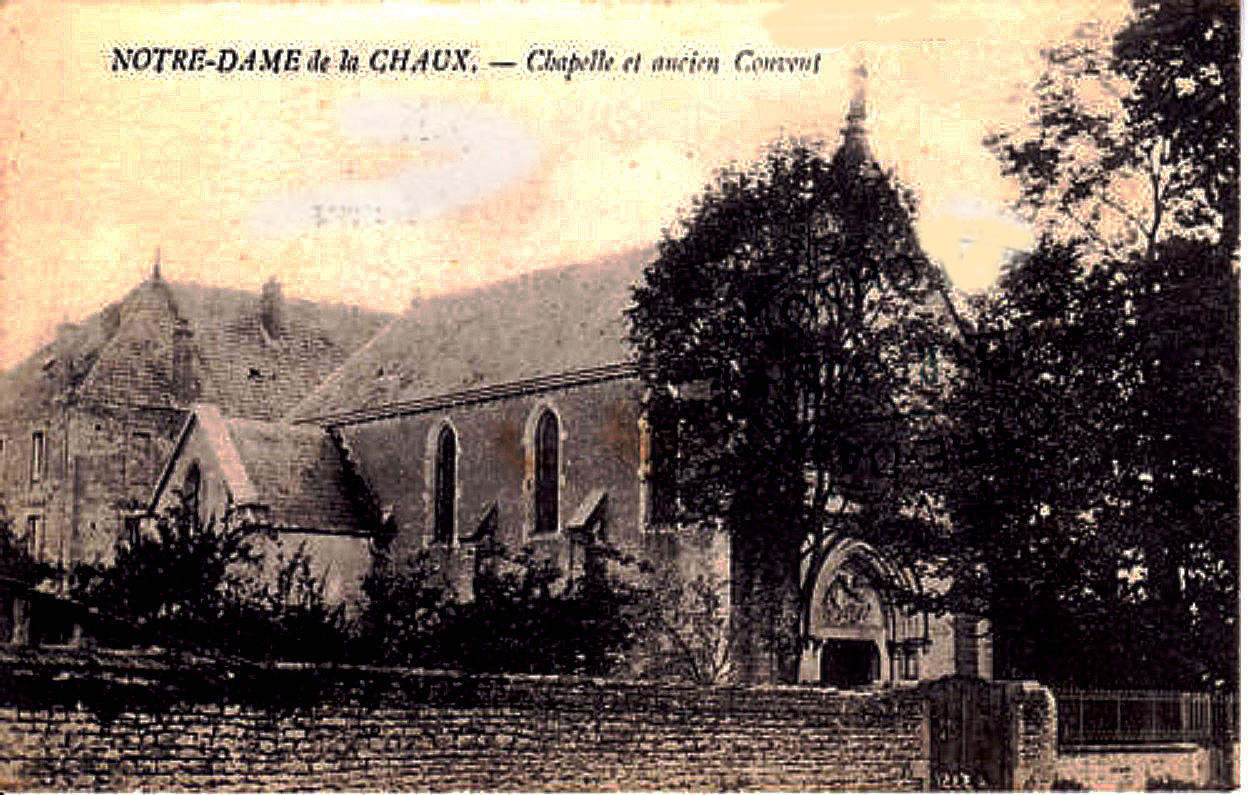 Notre-Dame de la Chaux à Cuisery